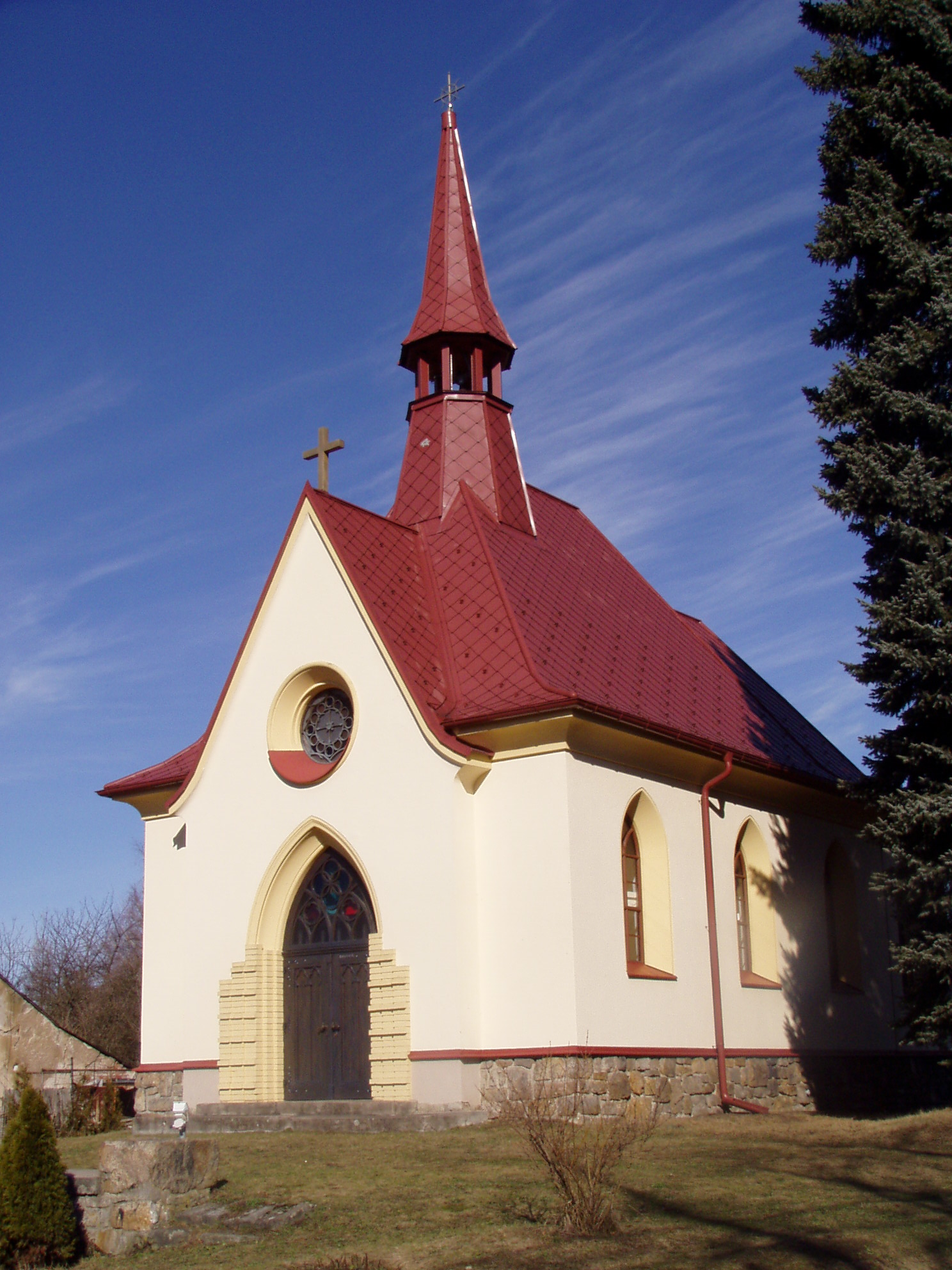 Vysokov - kaple